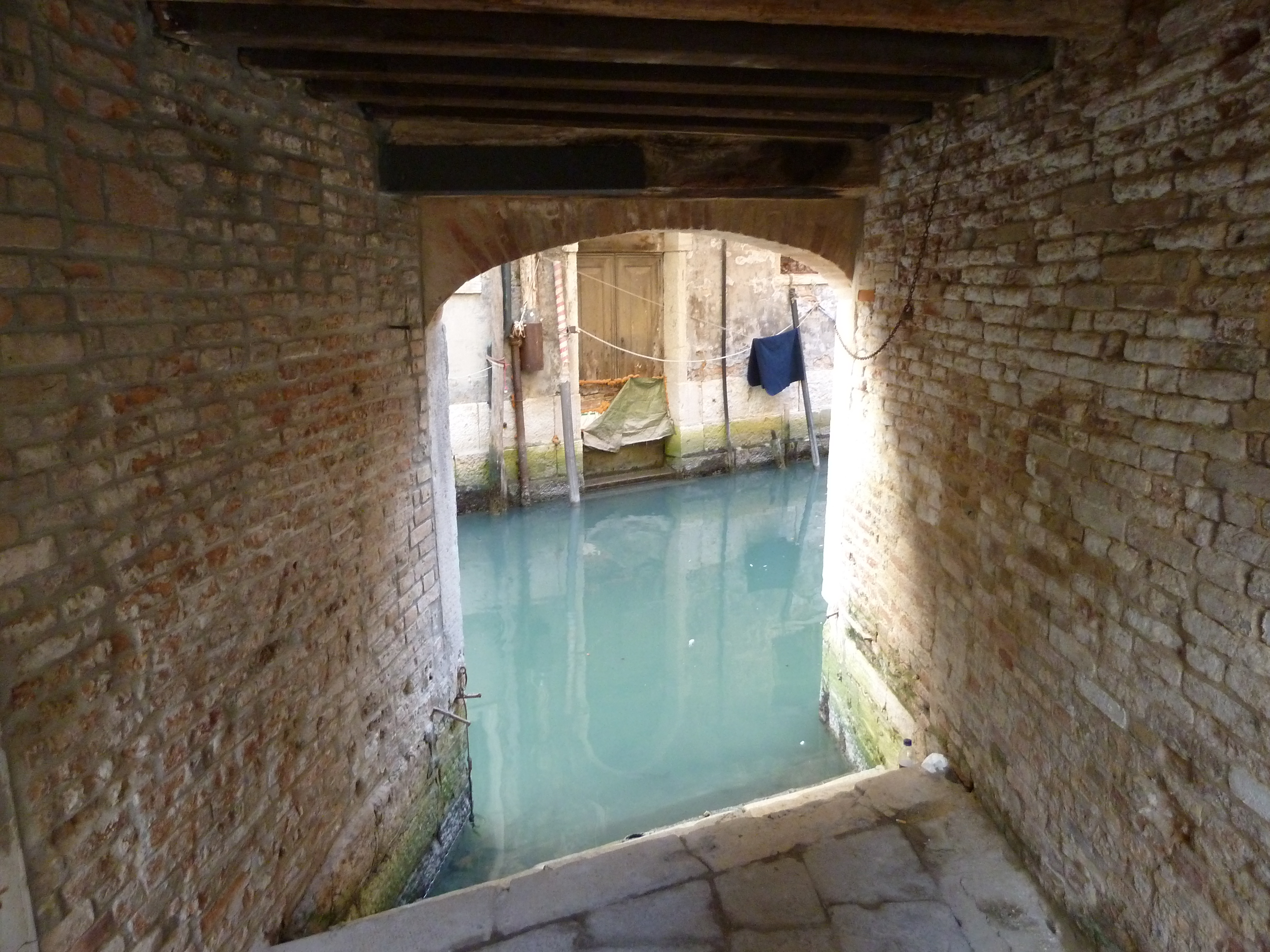 Rio del Cappello (Venice)